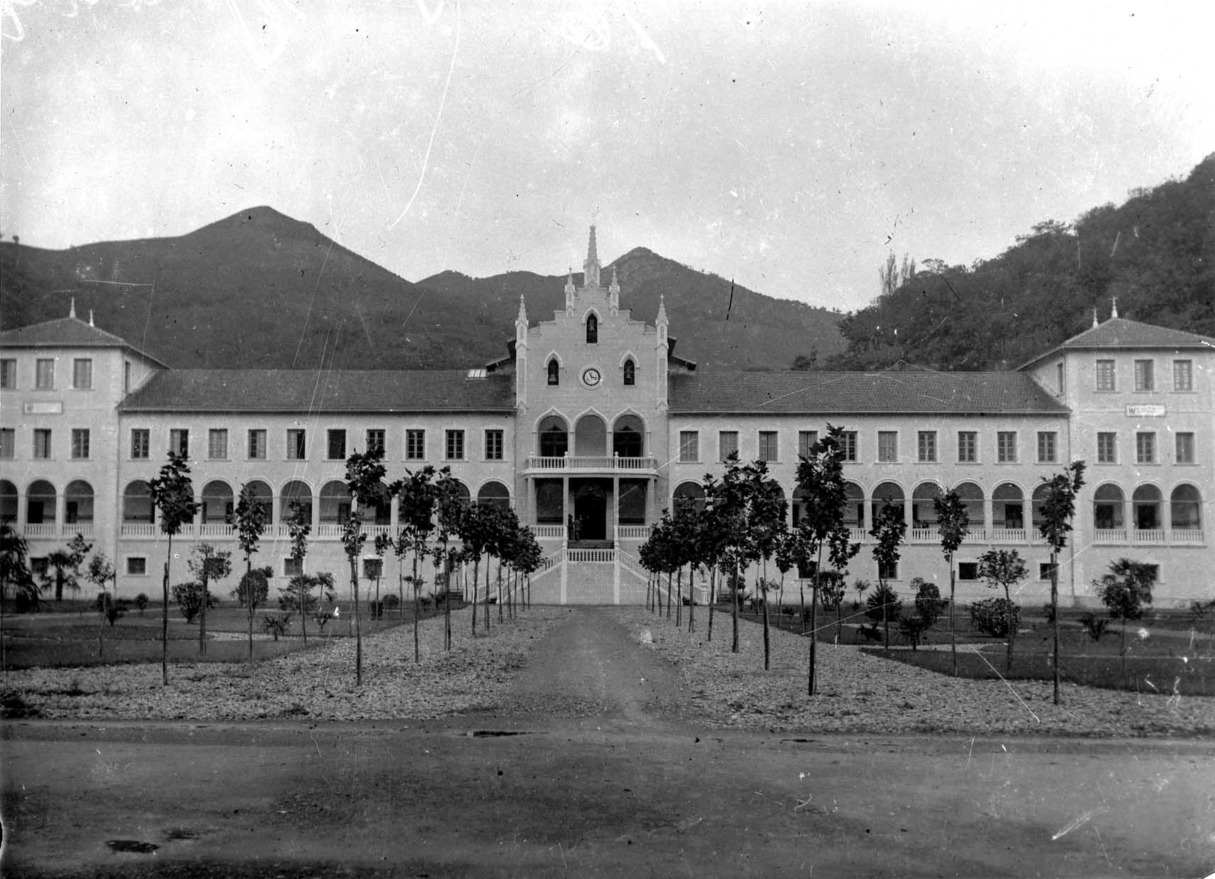 Santa Ageda sanatorioa